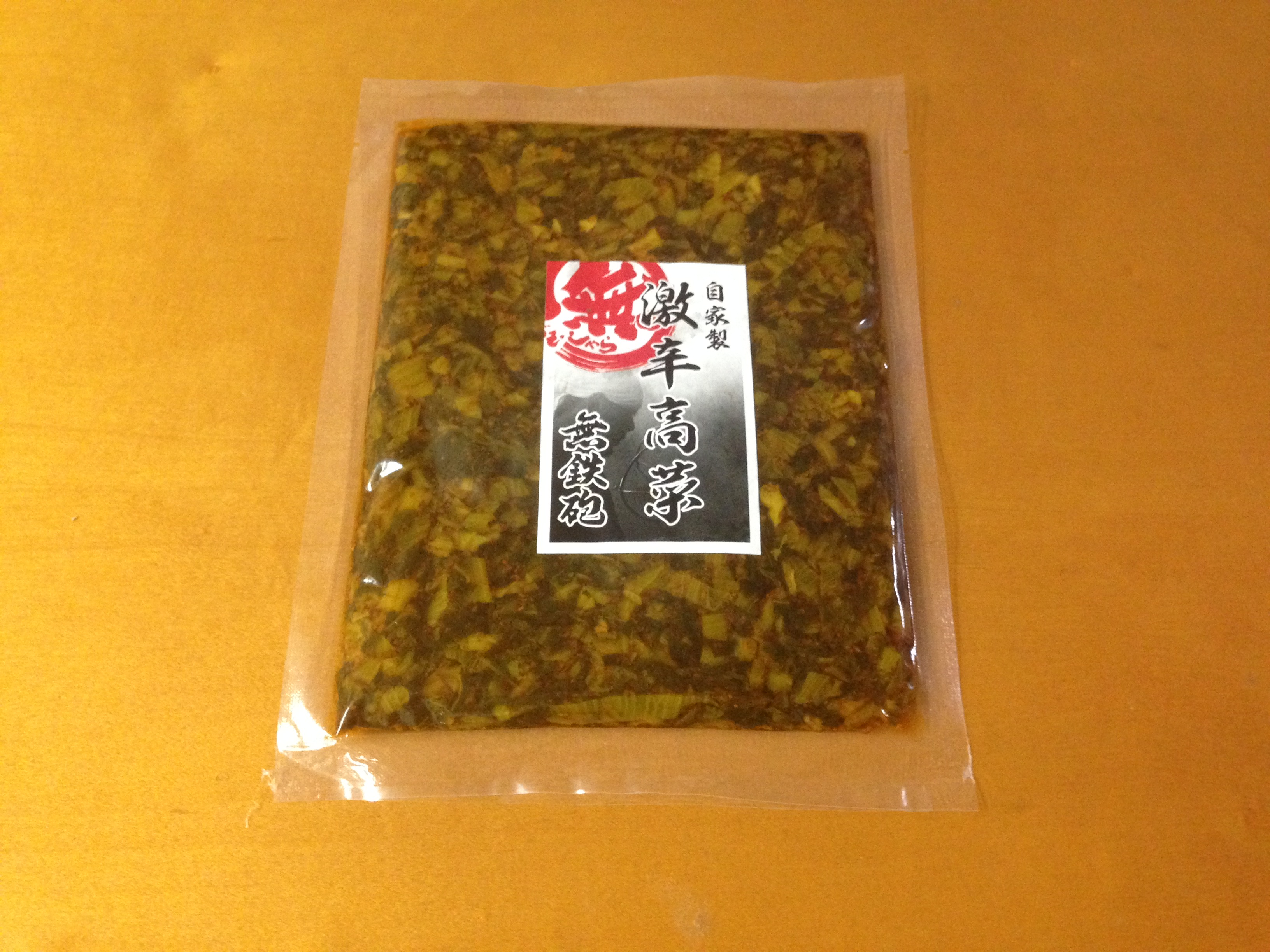 無鉄砲の持ち帰り用高菜。